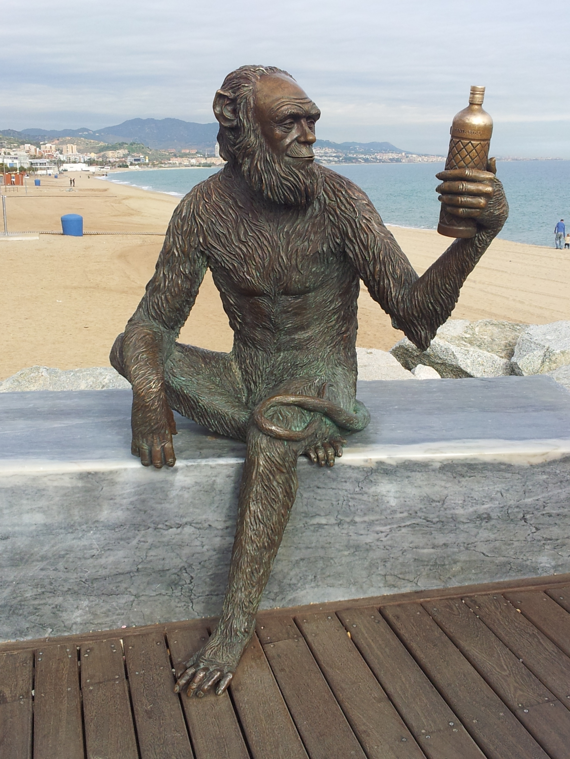 Estàtua realitzada per Susana Ruiz, dedicada a l'Anís del Mono, inaugurada el 7 de juliol del 2012, situada prop de la fàbrica d'Anís del Mono, sobre la plataforma d'entrada del Pont del Petroli, a la platja de Badalona, Catalunya. Fotografia realitzada el 3 de novembre del 2012, editada per a corregir-ne l'angle.